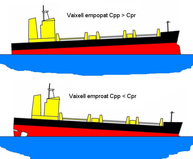 Aft draft over foward draft & viceversa (Catalan)